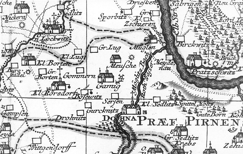 Original image description from the Deutsche Fotothek Dohna-Gamig. Seutter, Kirchenkreis Dresden, Mitte 18. Jh. (Sign.: VII 43)